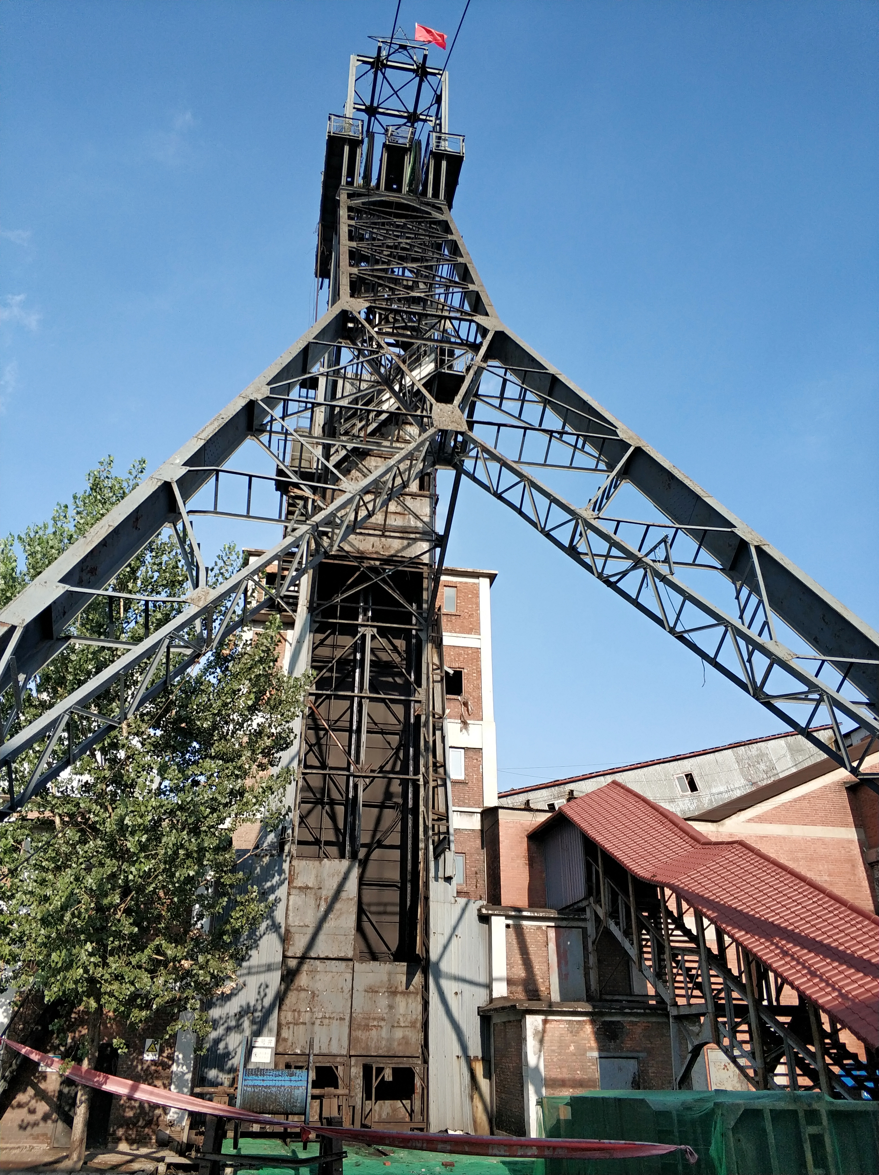 中文（中国大陆）: 开滦唐山矿